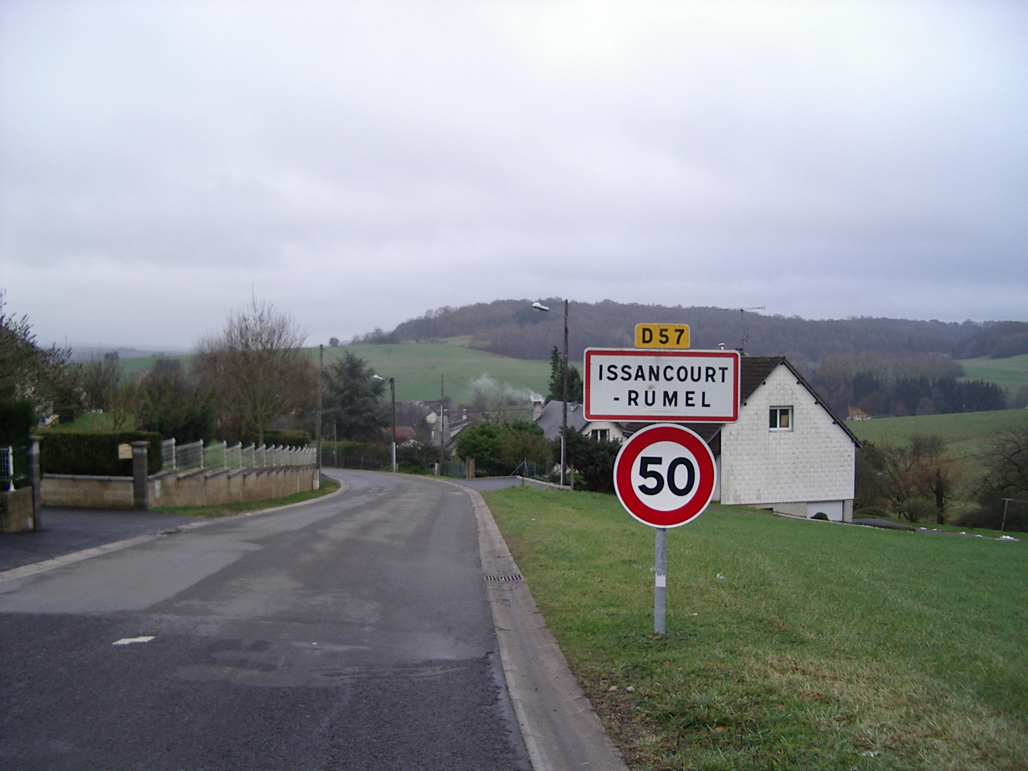 Issancourt-et-Rumel est une commune française, située dans le département des Ardennes et la région Champagne-Ardenne